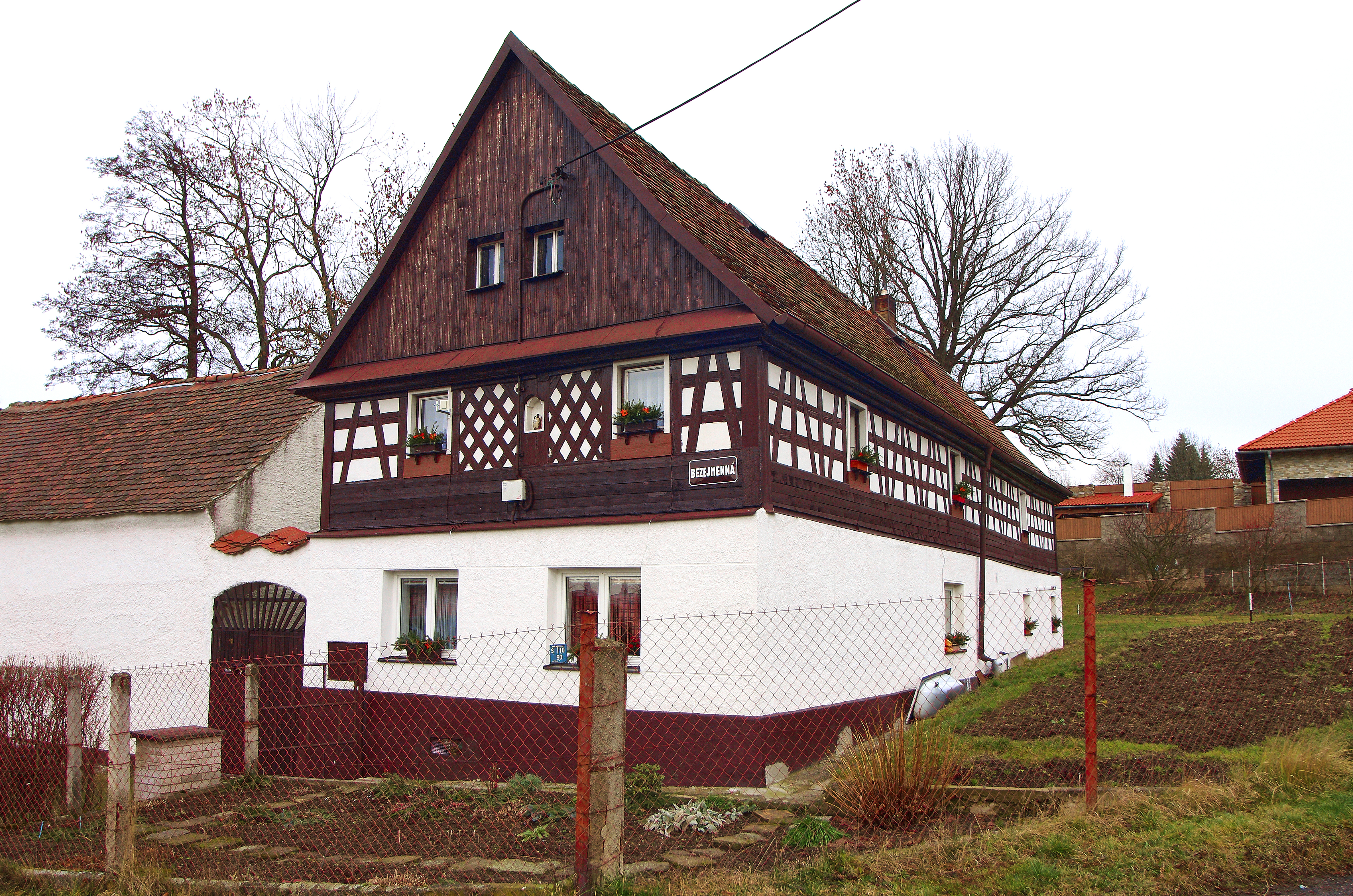 Venkovská usedlost (Březová), Březová 10